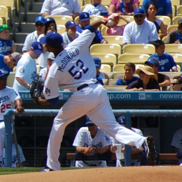 James McDonald